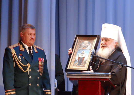 75-я годовщина со дня образования 5-й общевойсковой армии Восточного военного округа. Командующий армией генерал-лейтенант Валерий Асапов и митрополит Владивостокский и Приморский Вениамин. Уссурийск.